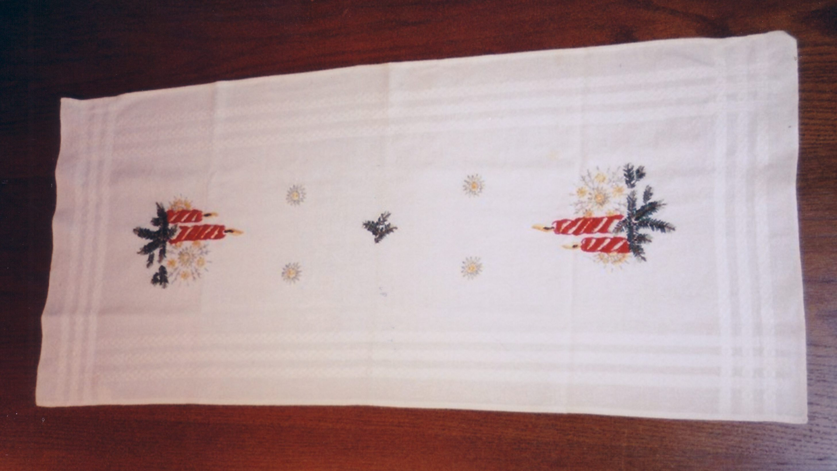 Tischläufer handbestickt, 1970er Jahre